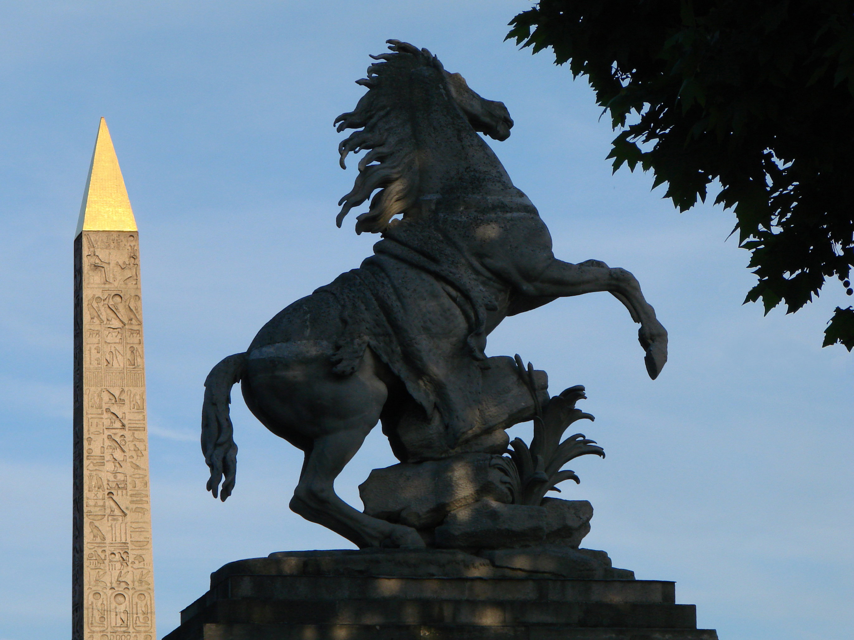 Un de chevaux de Marly, à l'entrée de la Place de la Concorde.(vu du côté des Champs-Elysées; copie de l'original déposé au Musée du Louvre.)